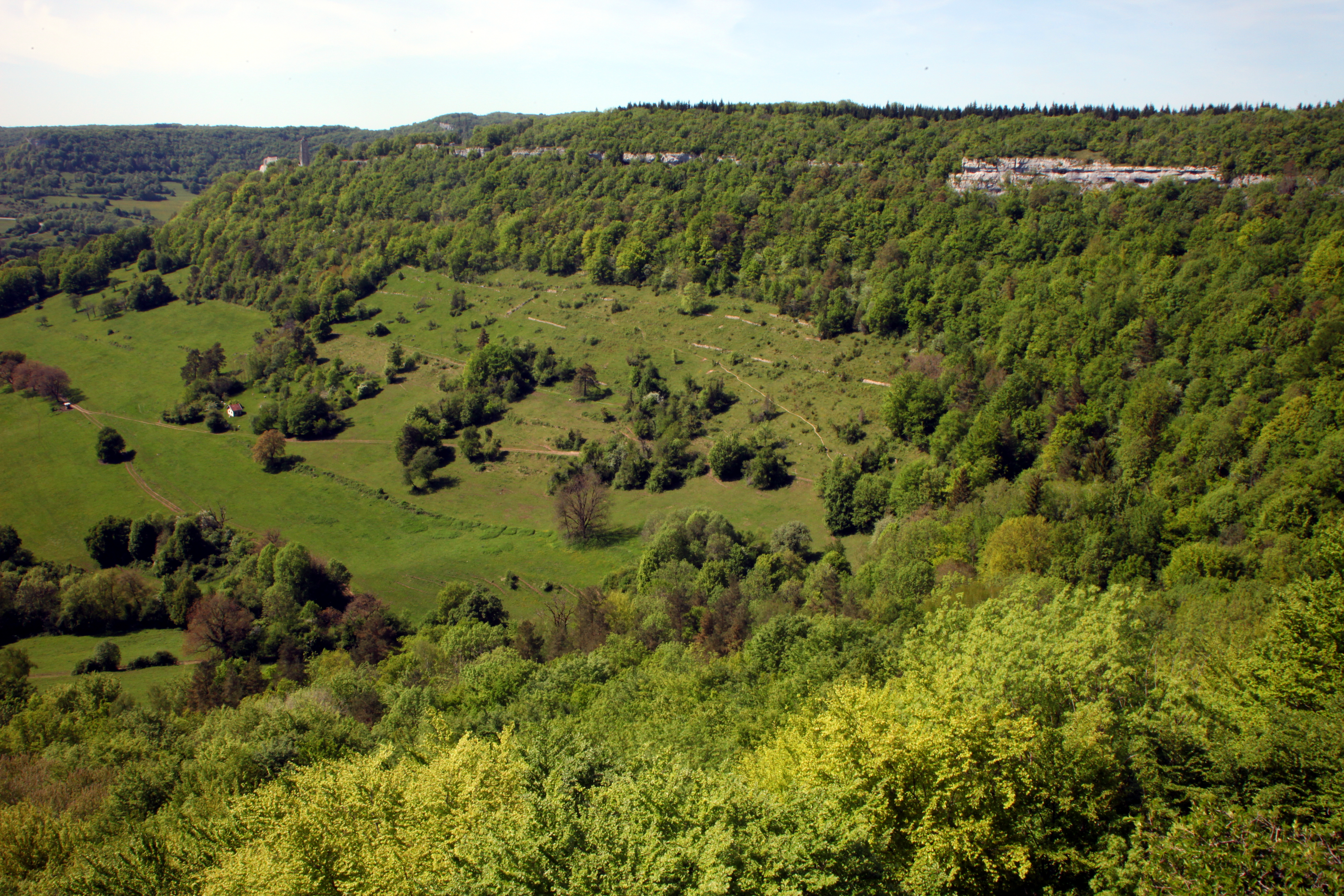 Coteau calcaire avec des pelouses sèches sur le bord nord du ravin de Valbois.